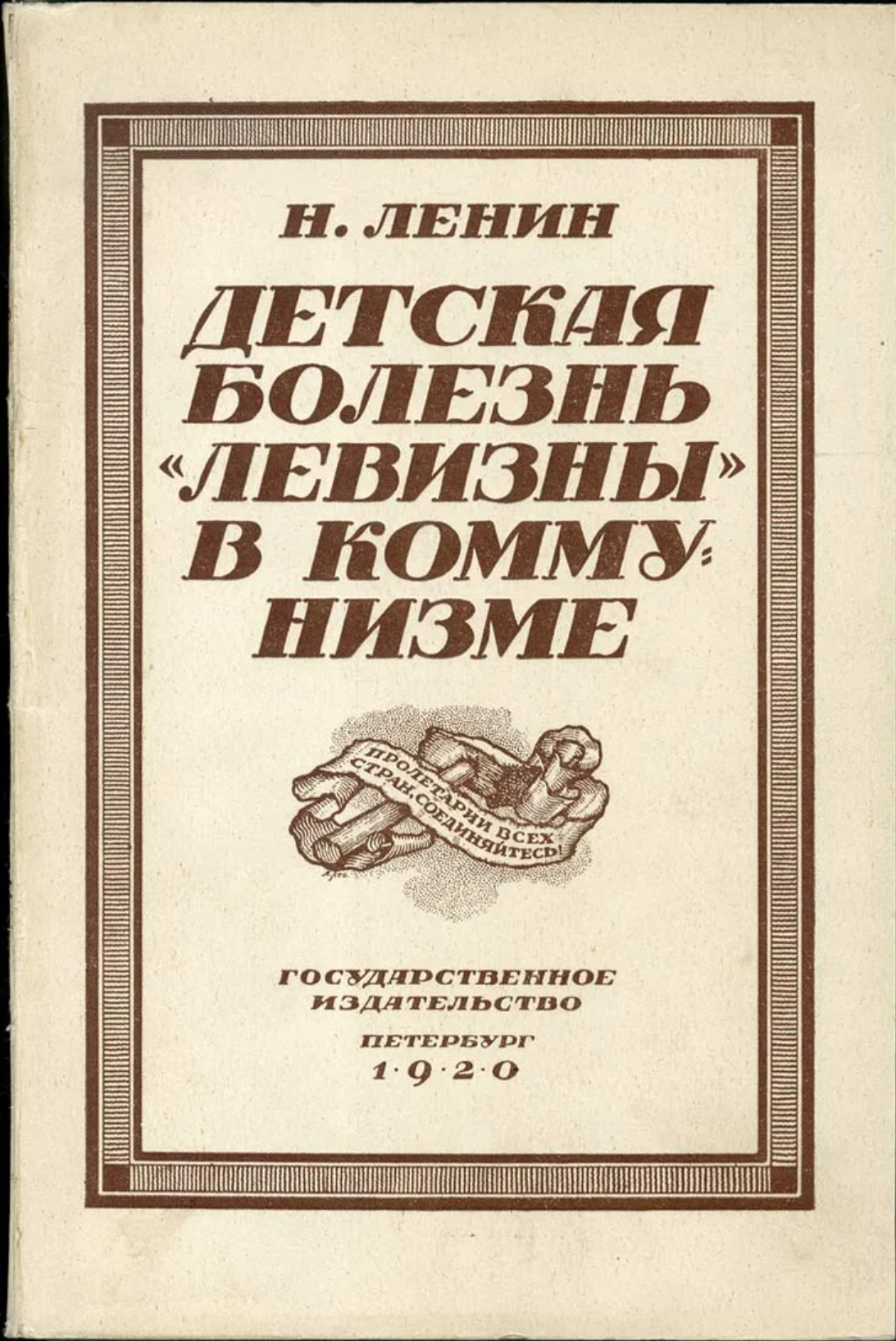 Детская болезнь «левизны» в коммунизме — труд В. И. Ленина, содержащий резкую критику противников большевизма из революционно-социалистического лагеря.